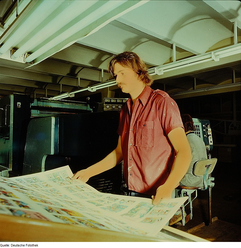 Original image description from the Deutsche FotothekFacharbeiter für Drucktechnik